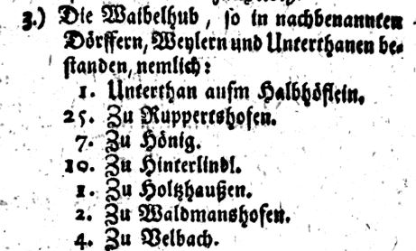 Aufstellung der Waibelhube (heimgefallenes württembergisches Lehen nach Aussterben der Schenken von Limpurg) im "Memorial" an den Fränkischen Kreiskonvent 1718. In: Electa juris publici 12 (1718), S. 883